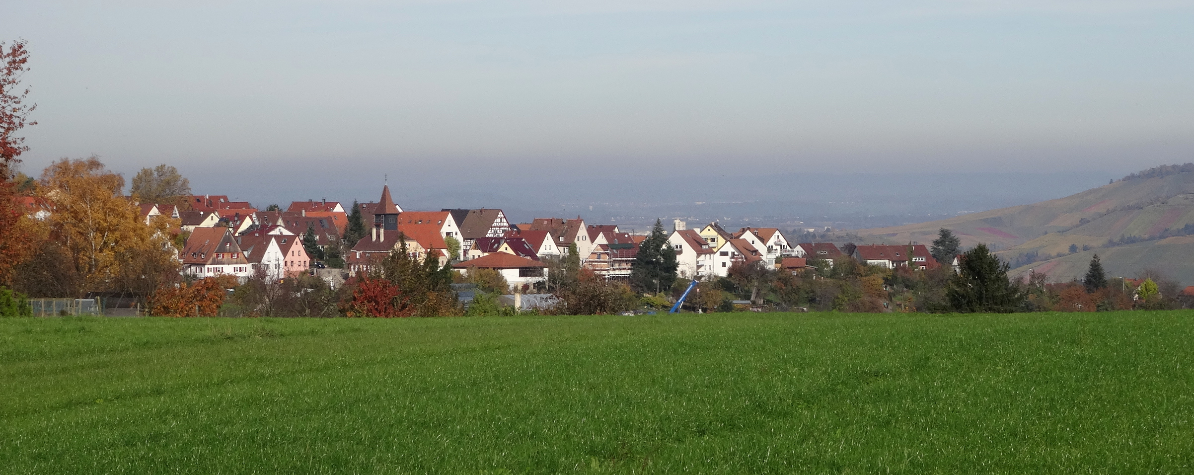 Altes Orstzentrum von Heumaden (Stuttgart) von Süd-Osten her gesehen.